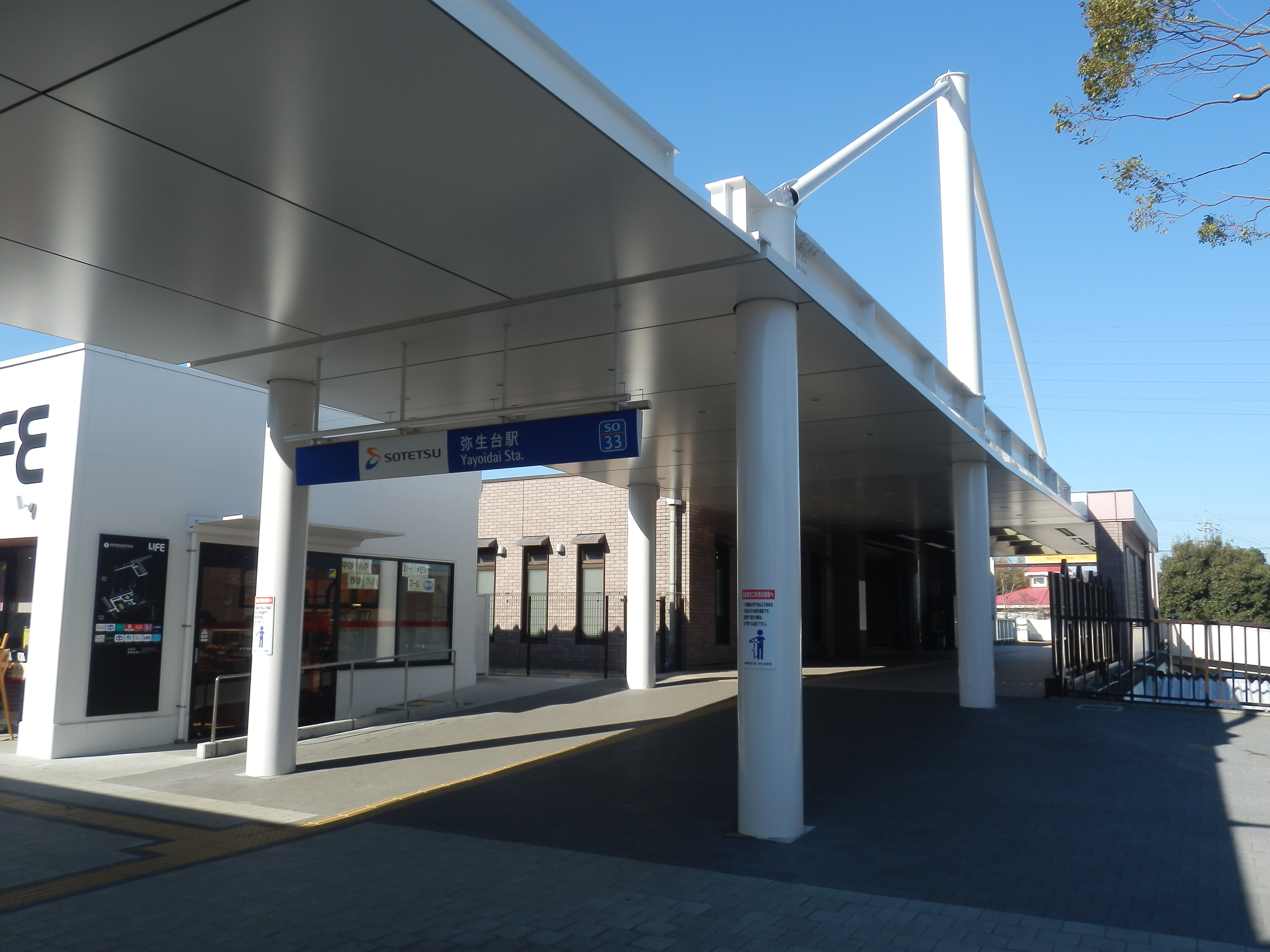 弥生台駅南口